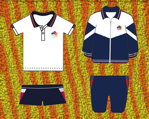 粵語: 而家有部分道具話舊時廣州梅花中學用過嘅校服品種